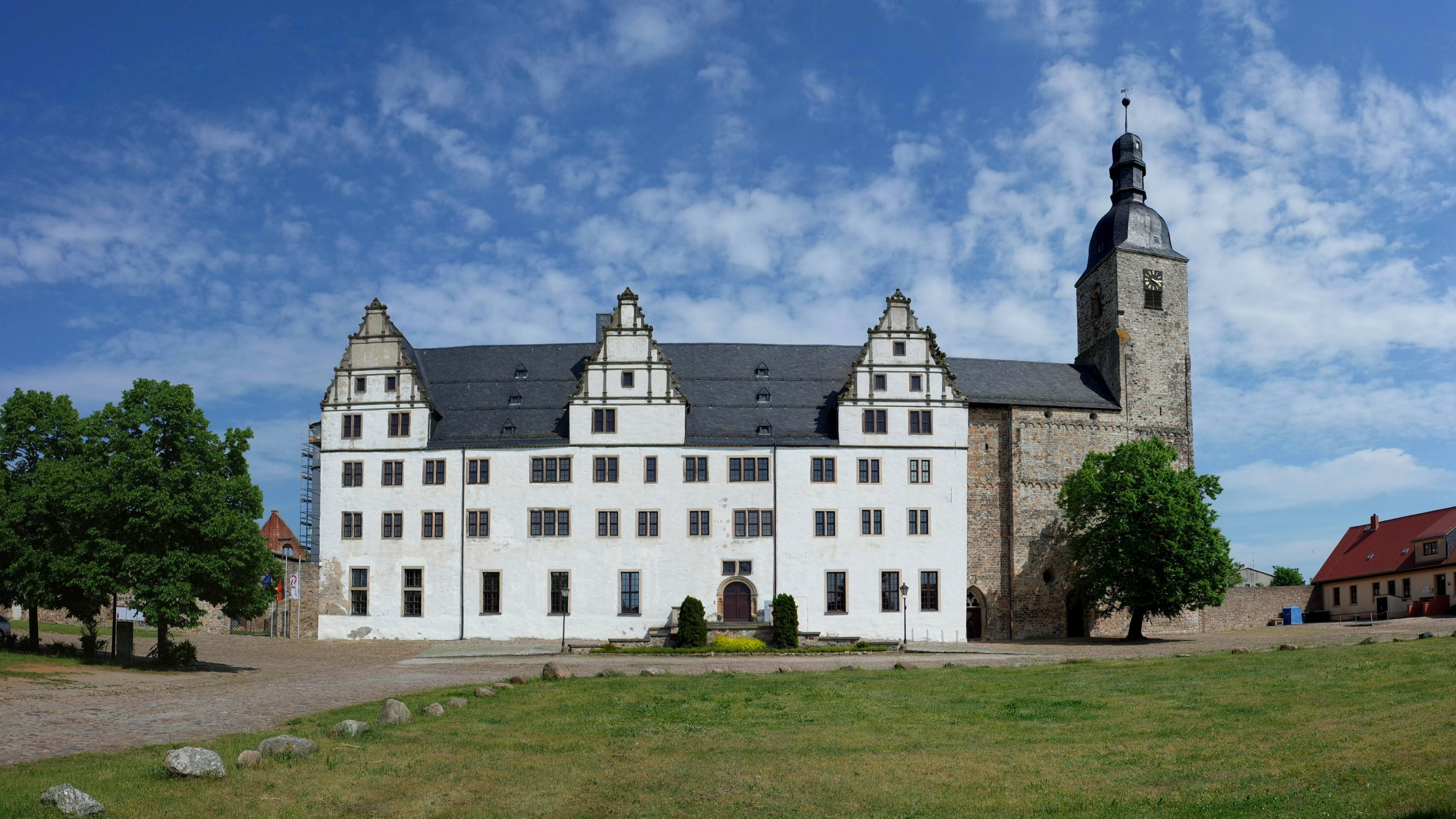 Gommern, Schloss im Ortsteil Leitzkau